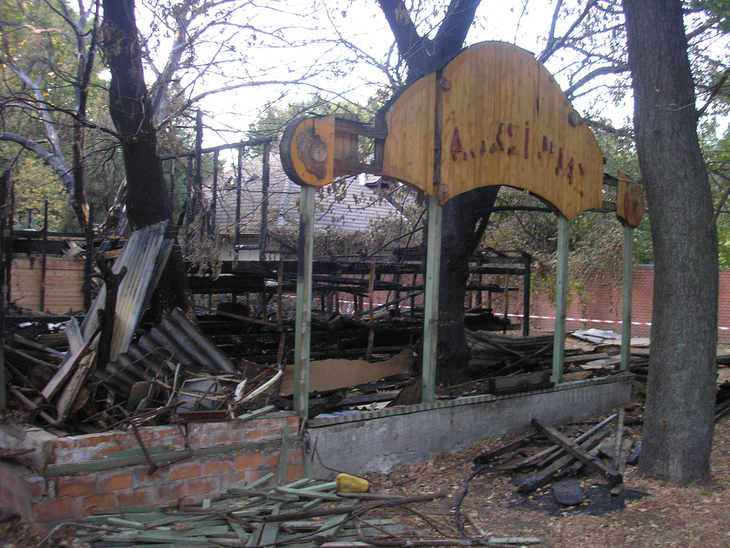 A népligeti bábszínház a leégését követő napon (Budapest)